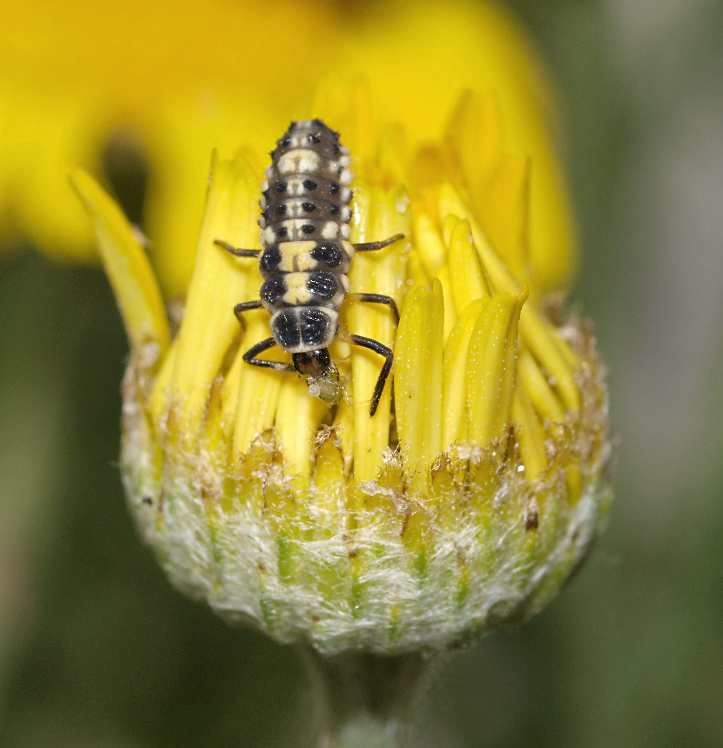 Propylea quatuordecimpunctata. Skakbræt larve i færd med at fortære en bladlus.